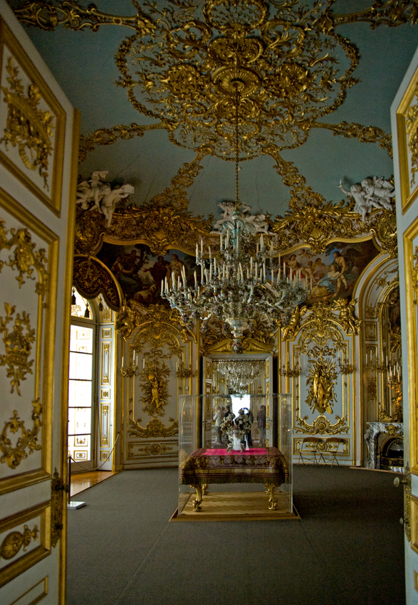 Neues Schloss Herrenchiemsee, Speisesaal